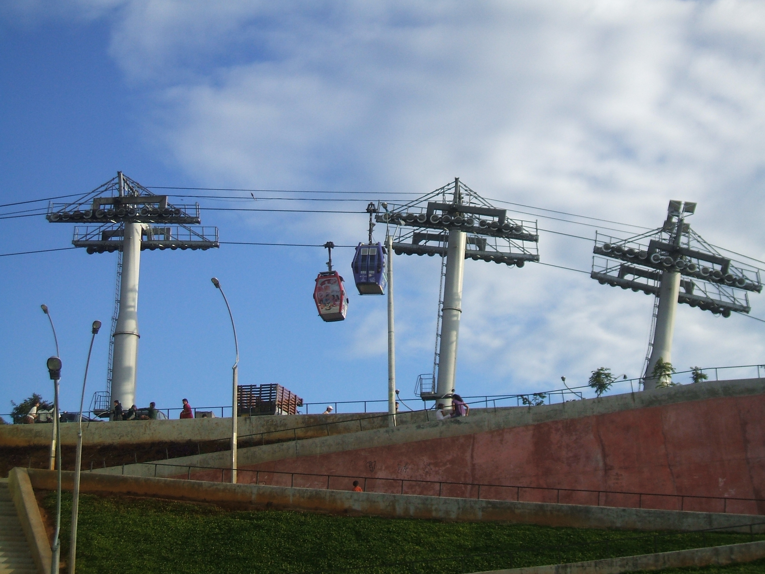 Gàidhlig: Am metrocable ann an Santo domingo savio